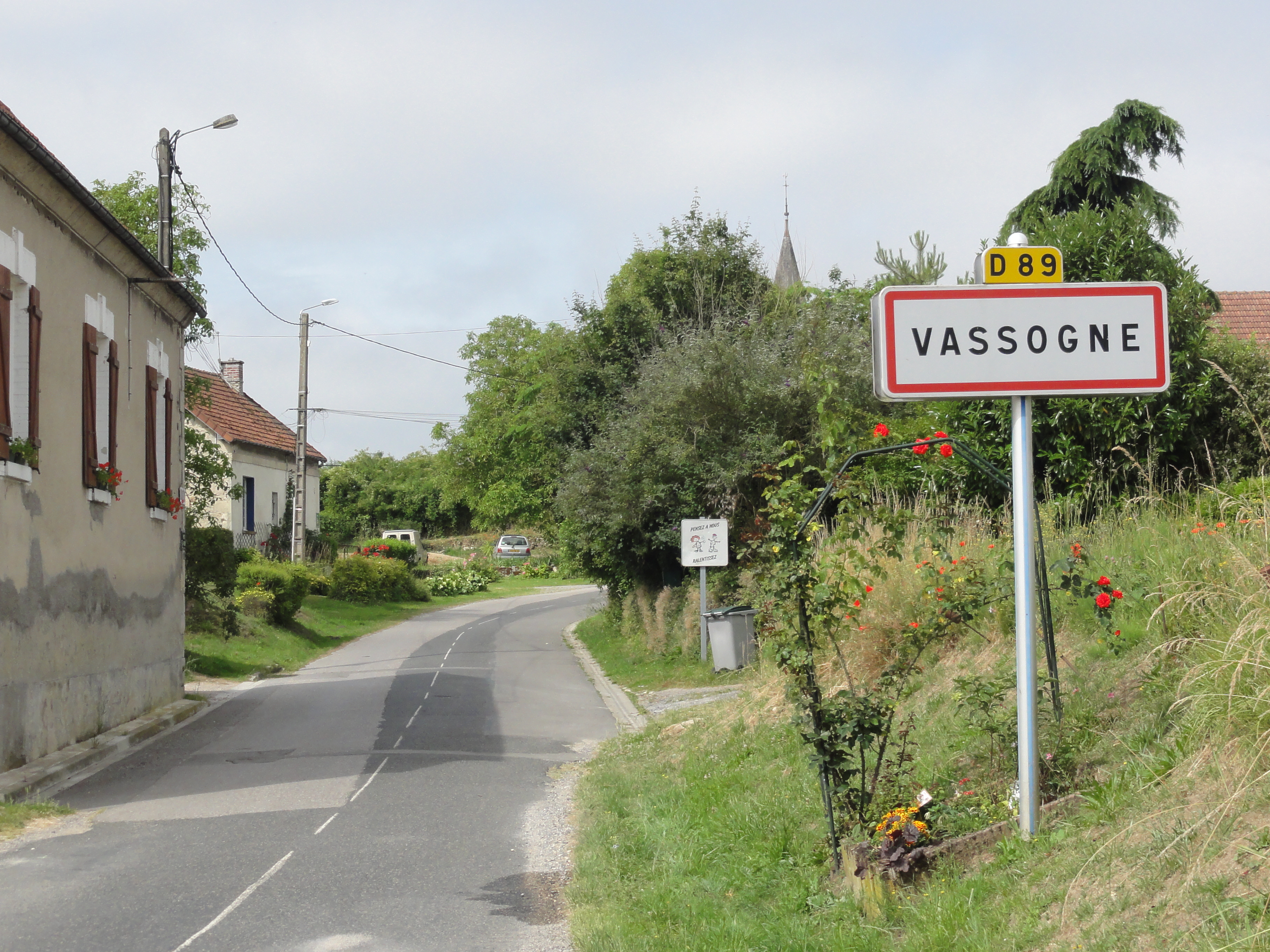 Vassogne (Aisne) city limit sign